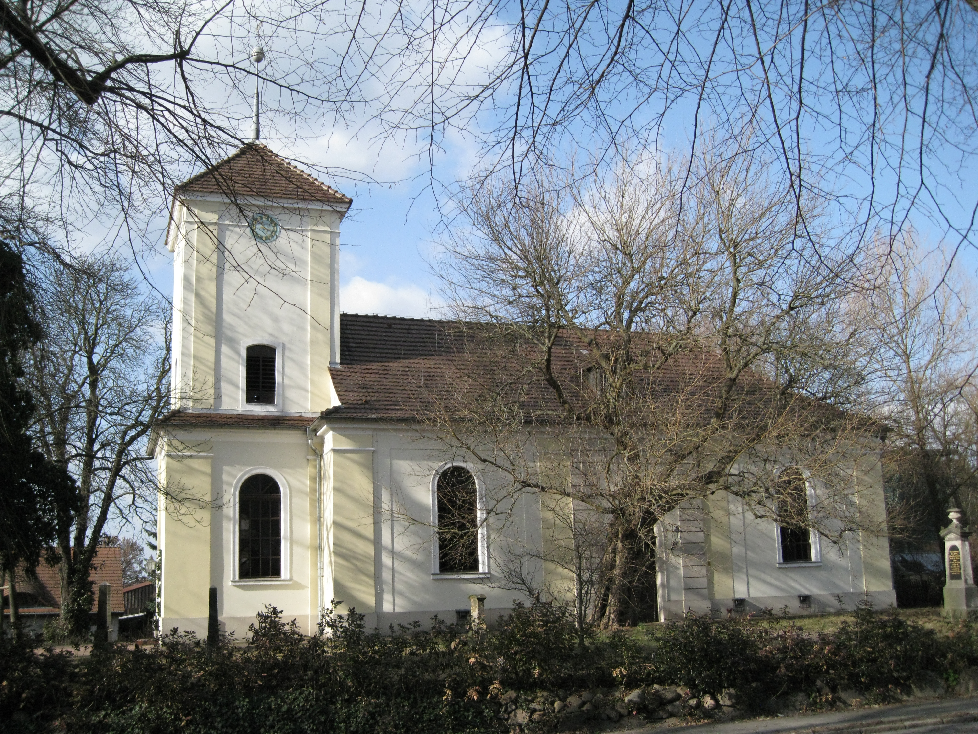 Dorfkirche Lübars, Ansicht vom Kirchenschiff